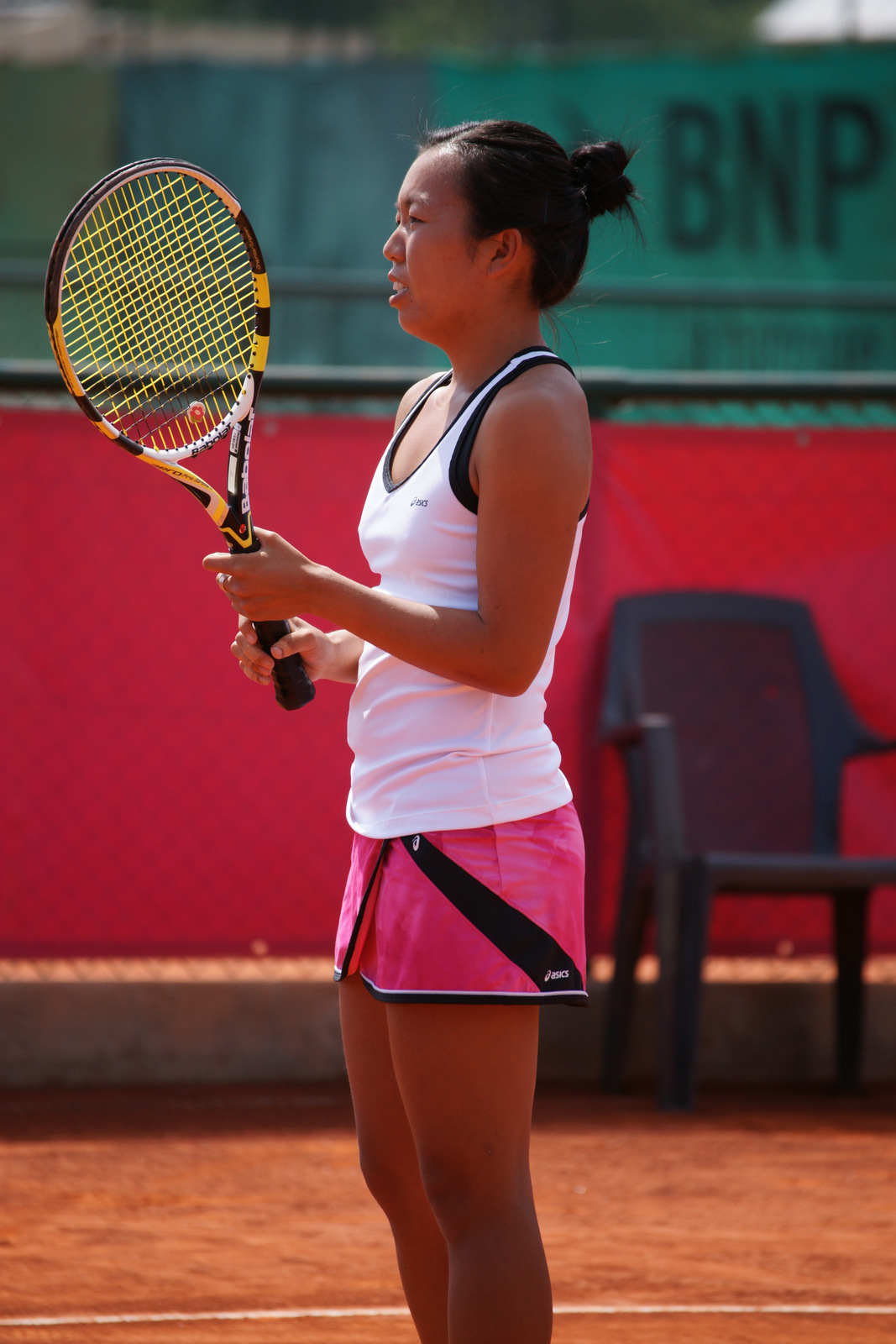 Vania King, Open ITF Cagnes-sur-Mer 2013